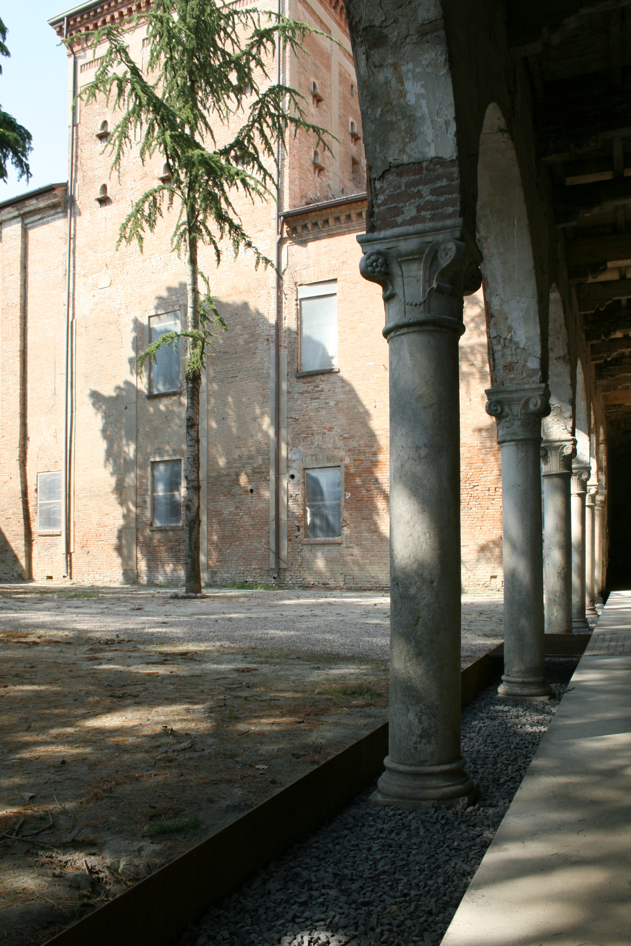 Villa Mensa, delizia estense a Copparo